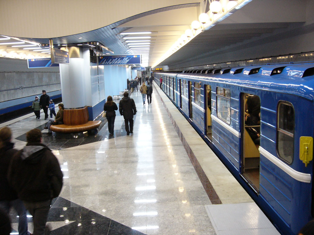 Metro station Uruch'e (Уручье, Уручча) in Minsk, Belarus